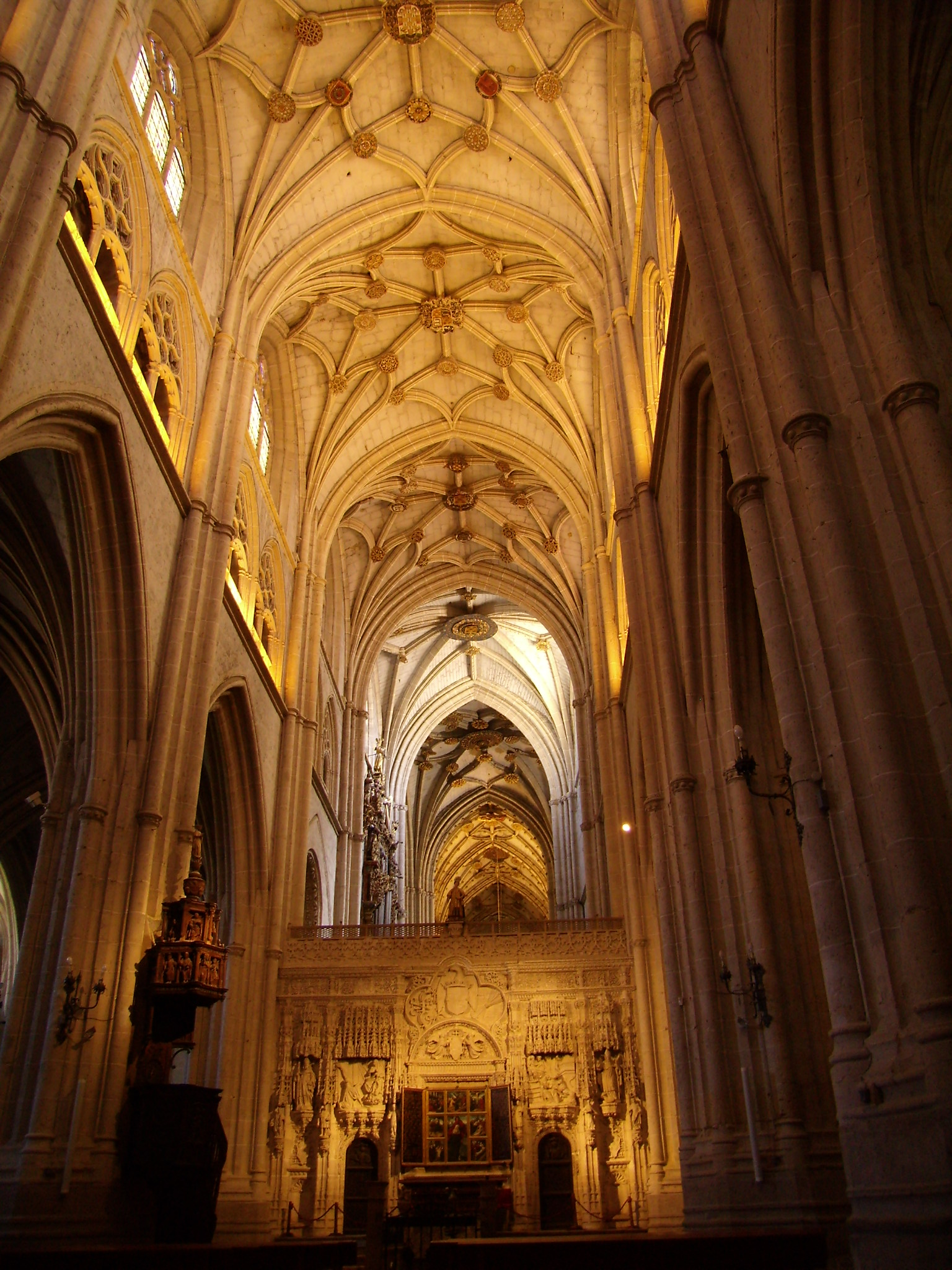 Nave central de la Catedral de Palencia, vista desde los pies del templo.